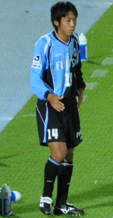 Kawasaki Frontale vs Gamba Osaka_292